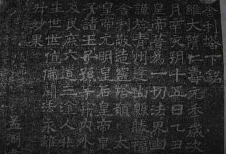 越南出土的刻於隋代仁壽元年（601年）的《舍利塔銘》